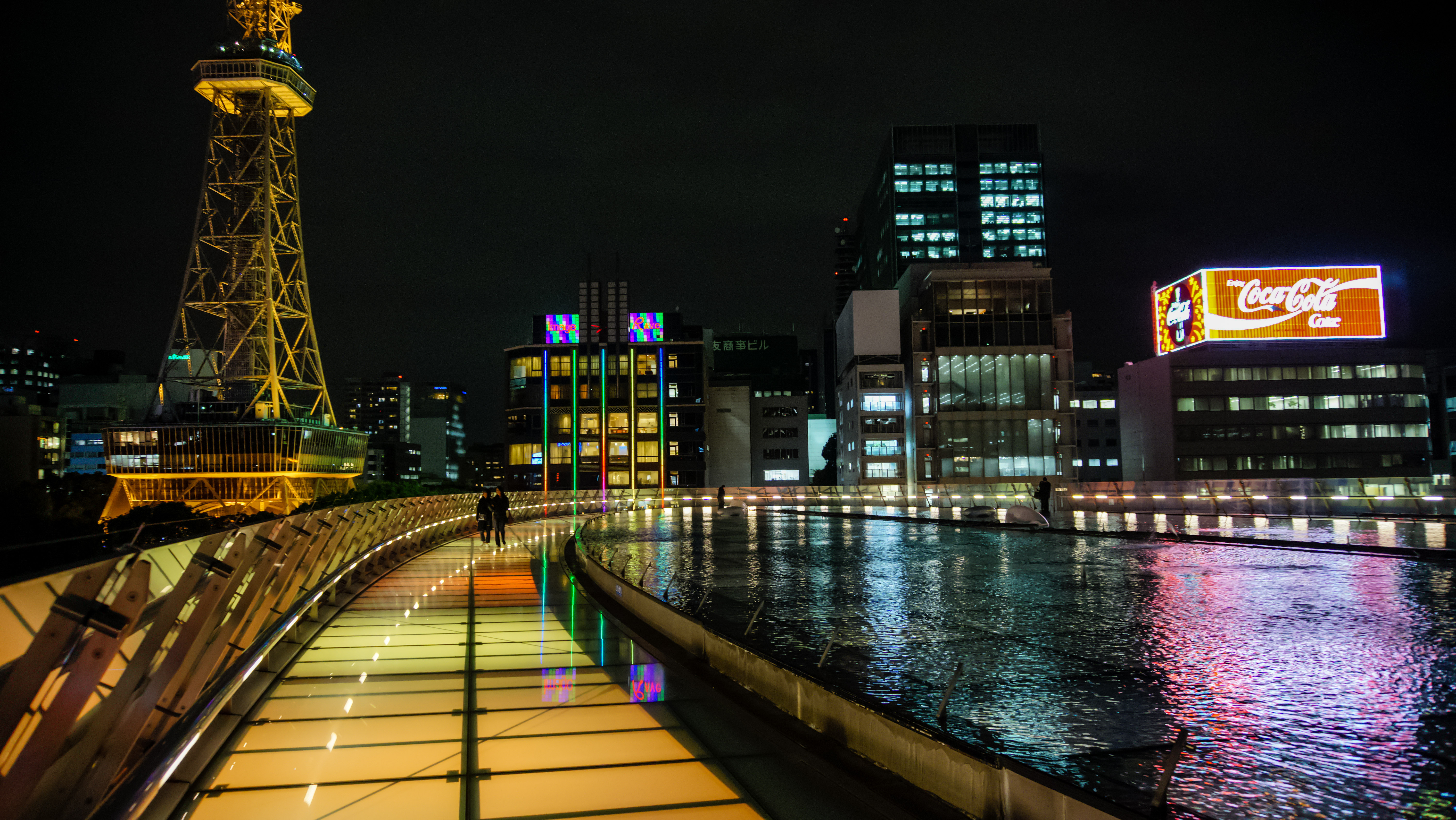 2016 Japan Nagoya_81